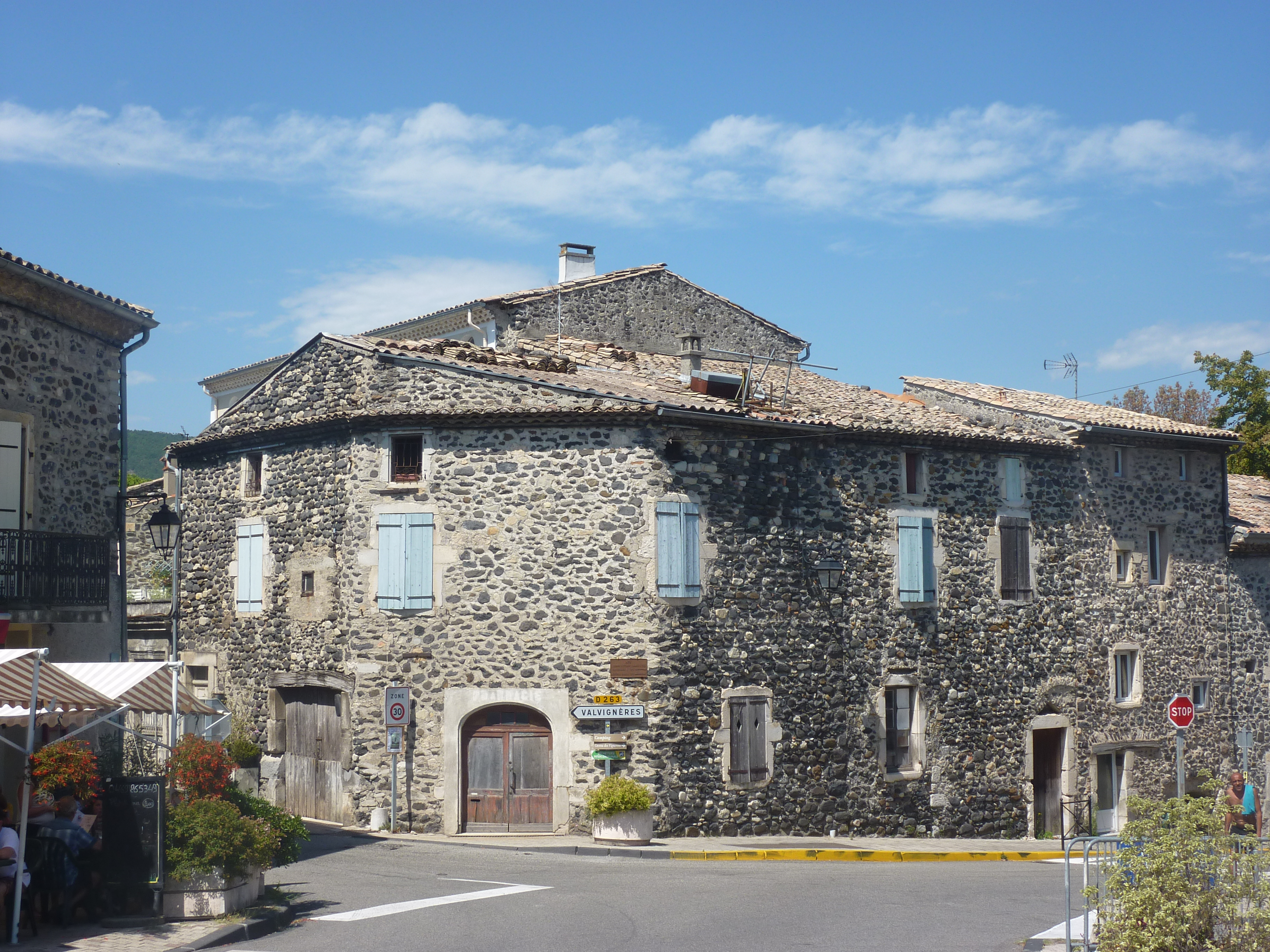 La première maison du peintre Ginés Parra à Alba-la-Romaine